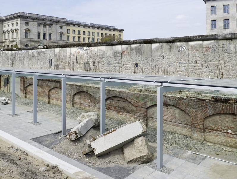 Ausstellungsgraben des NS-Dokumentationszentrum Topographie des Terrors